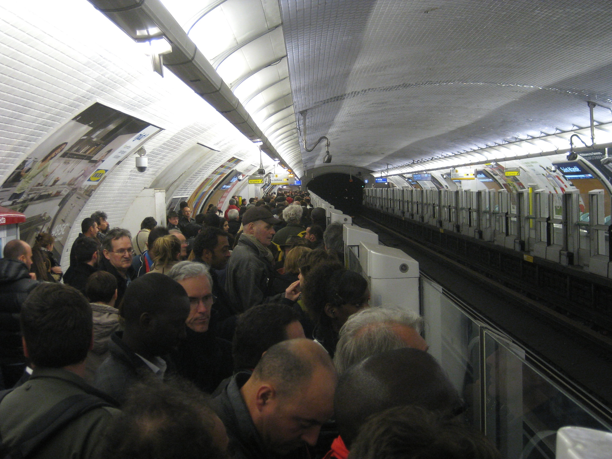 La station de métro parisien Saint-Mandé après sa rénovation, et la pose des portes palières, un jour d'affluence exceptionnel.